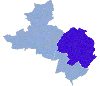 Powiat wschowski - Gmina Wschowa